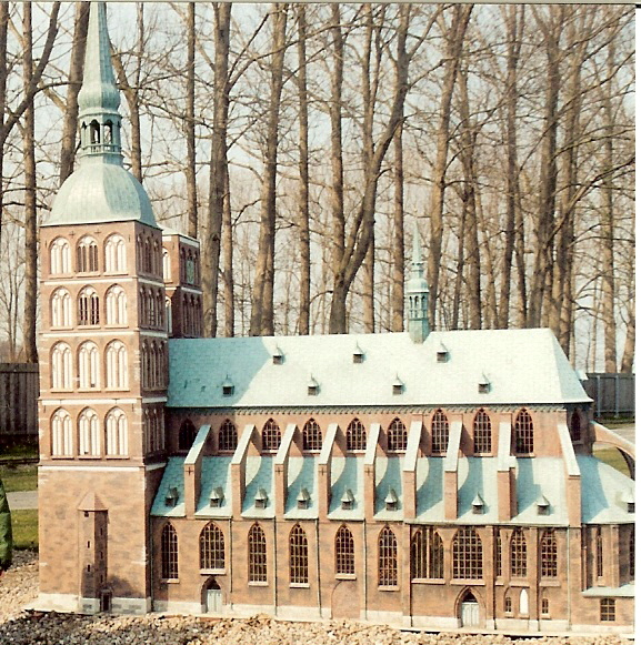 Nikolai-Kirche Stralsund als Miniatur